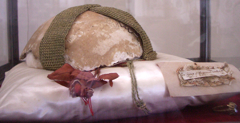 Altshausen, Landkreis Ravensburg: Schlosskirche, Reliquie Hermanns von Reichenau